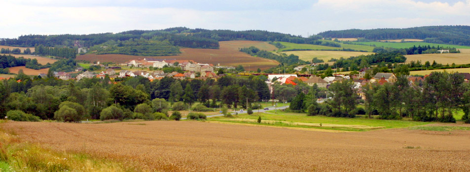 Pohled na Mladotice od severovýchodu, ze silnice na Trojany. Autor: Adam Hauner Datum: 5. 8. 2006